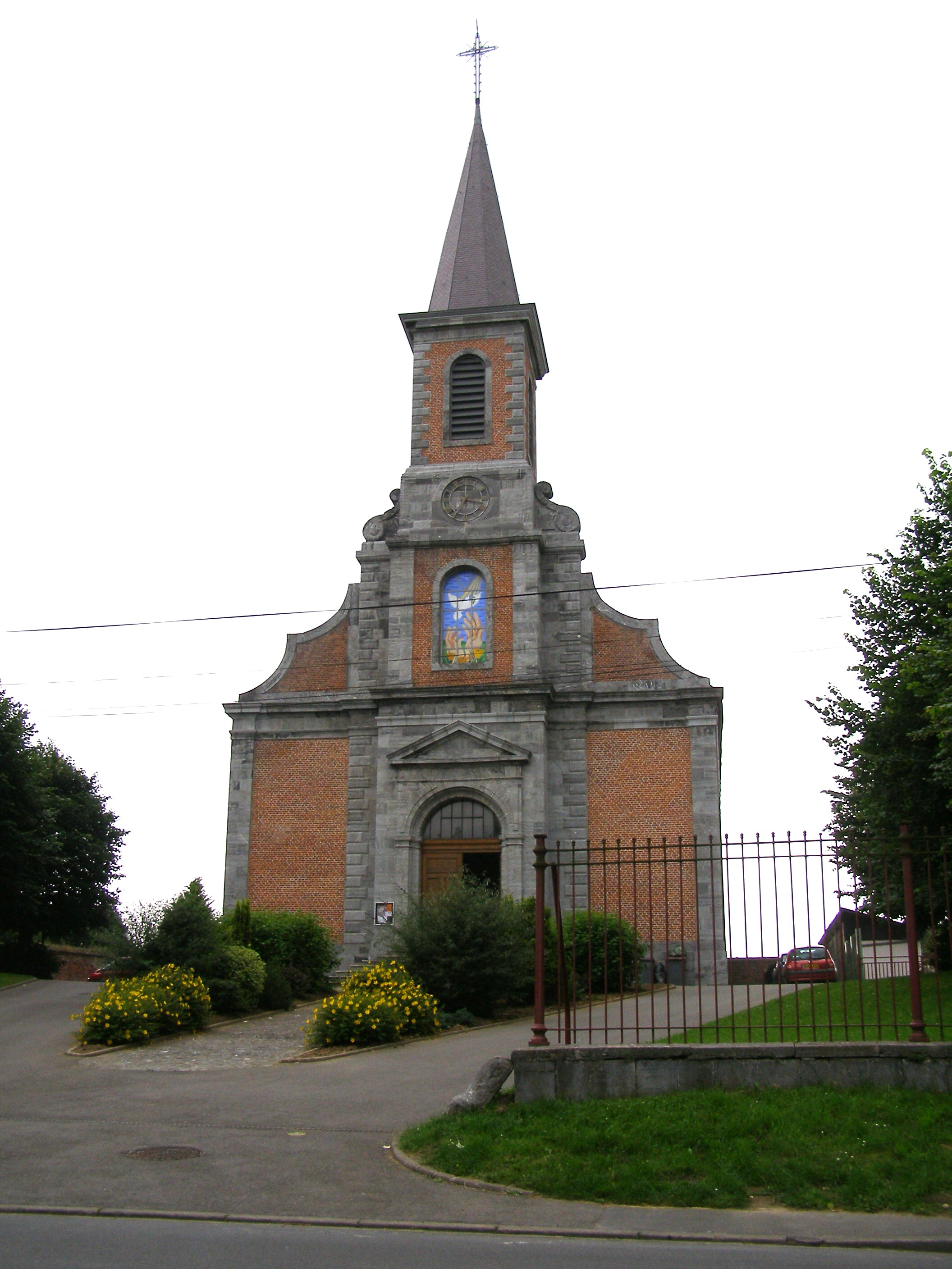 église paroissiale Saint-Barthélémy This building is indexed in the Base Mérimée, a database of architectural heritage maintained by the French Ministry of Culture, under the references IA59000618 and type.